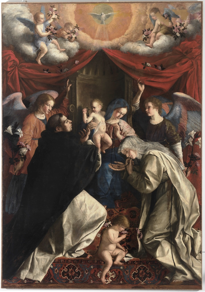 Pinacoteca civica Bruno Molajoli